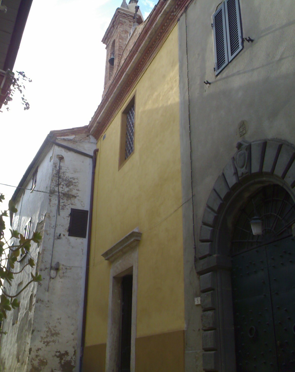 Esterno Chiesa della Compagnia Santa Croce Farnetella (Siena)